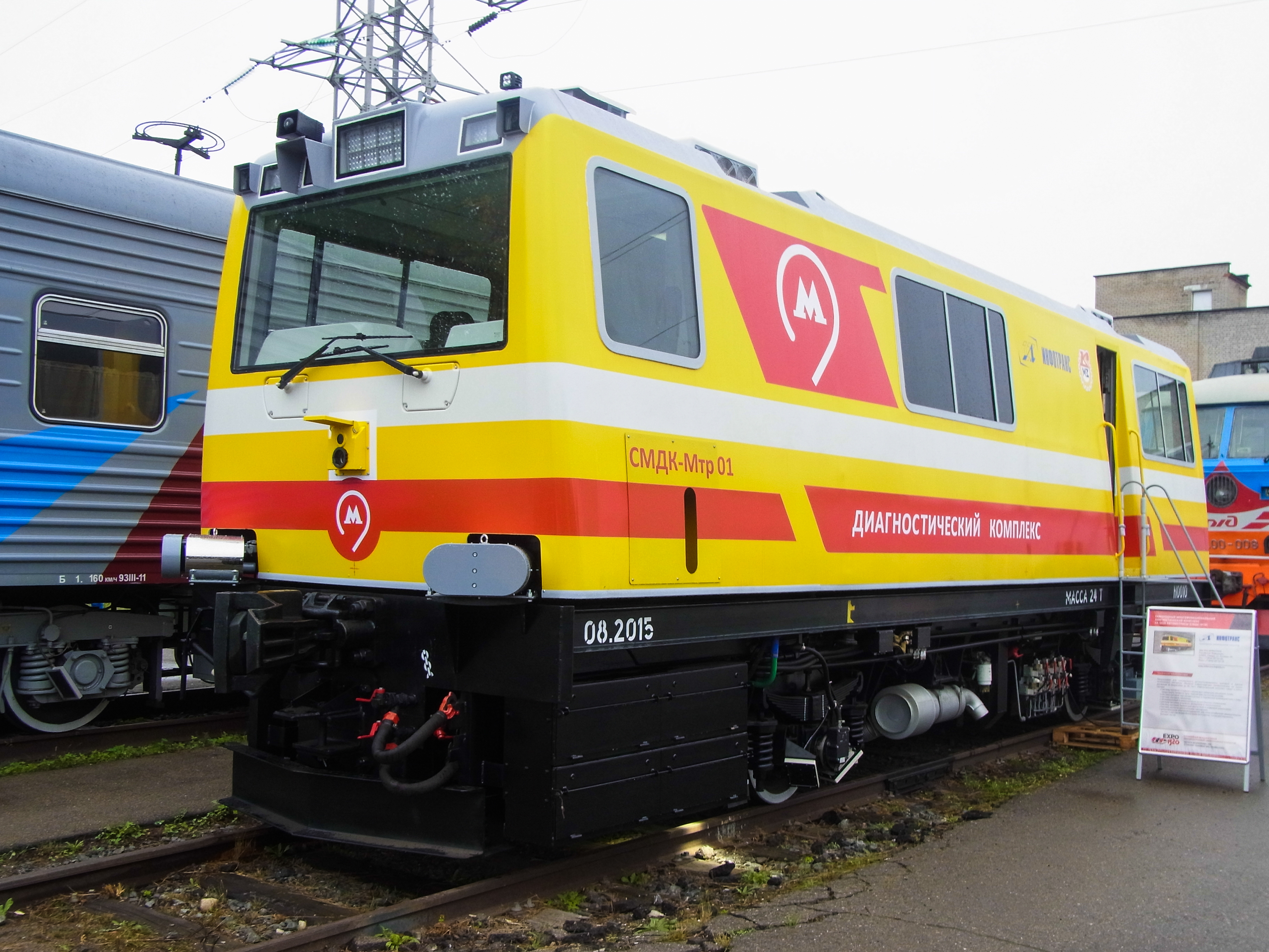 Диагностическая автомотриса СМДК-МТр-01 на выставе Экспо 1520 в Щербинке. Эксплуатируется в Московском метрополитене